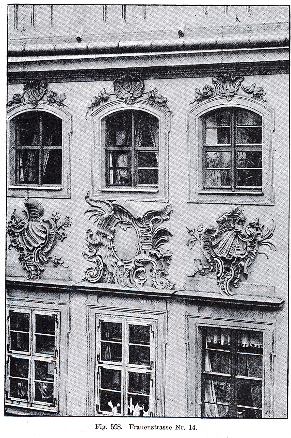 Dresden, Frauenstrasse Nr. 14, Fassade, erbaut von Johann Christoph Knöffel für den Böttchermeister Joh. Köhler, 1750